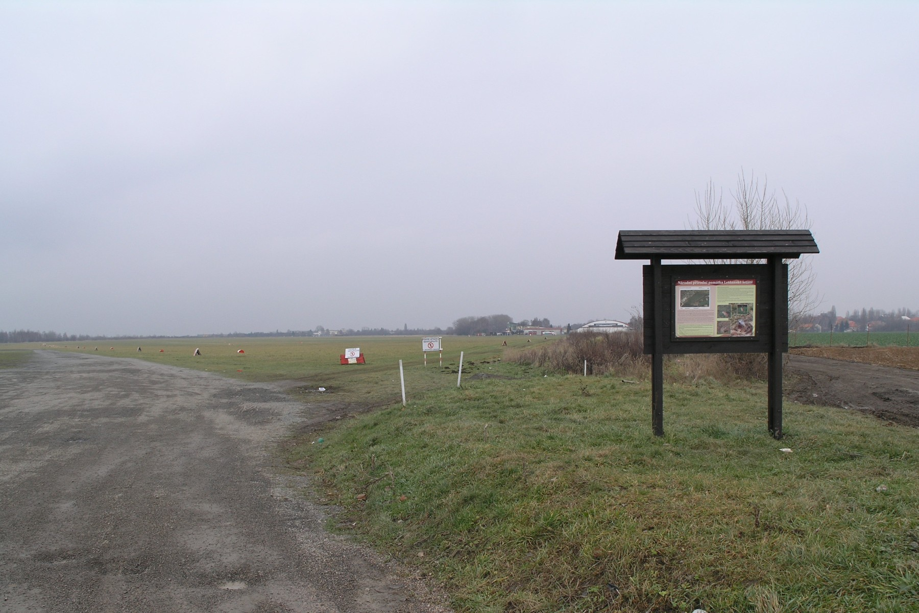 Letňany